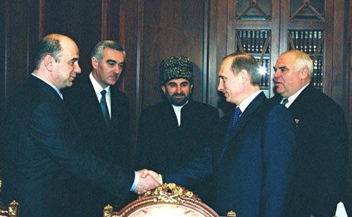 De maldekstre: La ĉefa federacia inspektoro pri Respubliko Inguŝio Musa Keligov, viculo de la plenrajtigita reprezentanto de la prezidanto de Rusio en Suda federacia regiono Murat Zjazikov, prezidanto de la Konsilio de muftioj de Norda Kaŭkazo Magomed Albogaĉijev, prezidanto de Rusio Vladimir Putin, la plenrajtigita reprezentanto de la prezidanto de Rusio en Suda federacia regiono Viktor Kazancev. Antaŭ la kunveno pri socio-ekonomia evoluo de Inguŝio